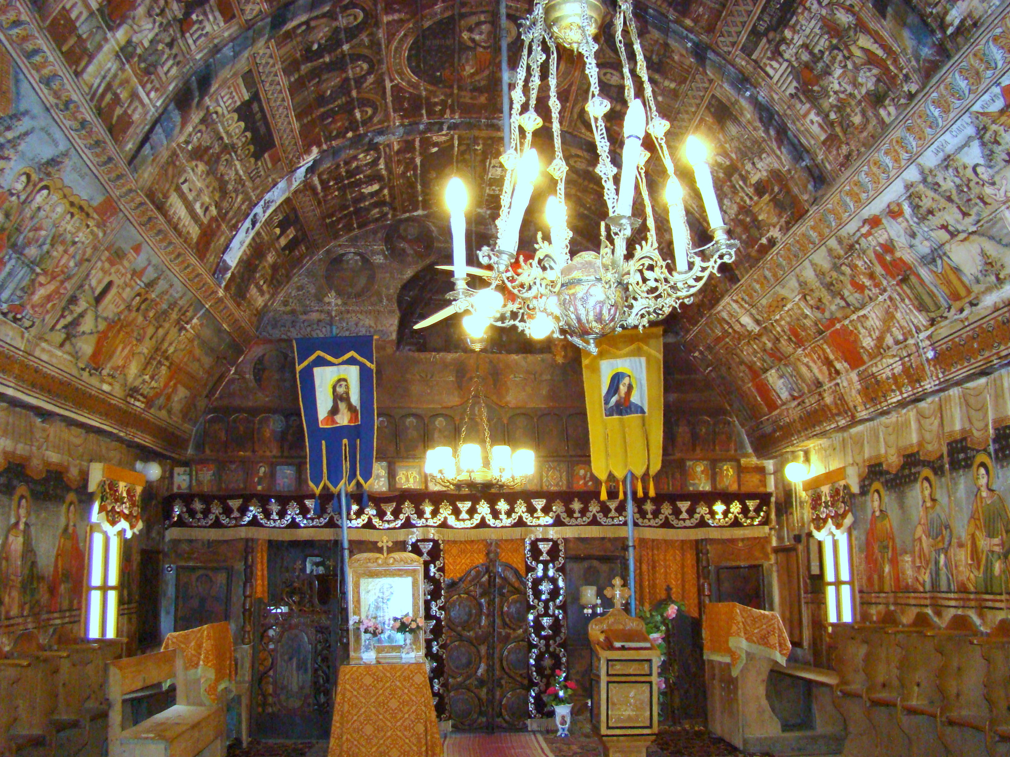 Urișiu de Sus, Mureș